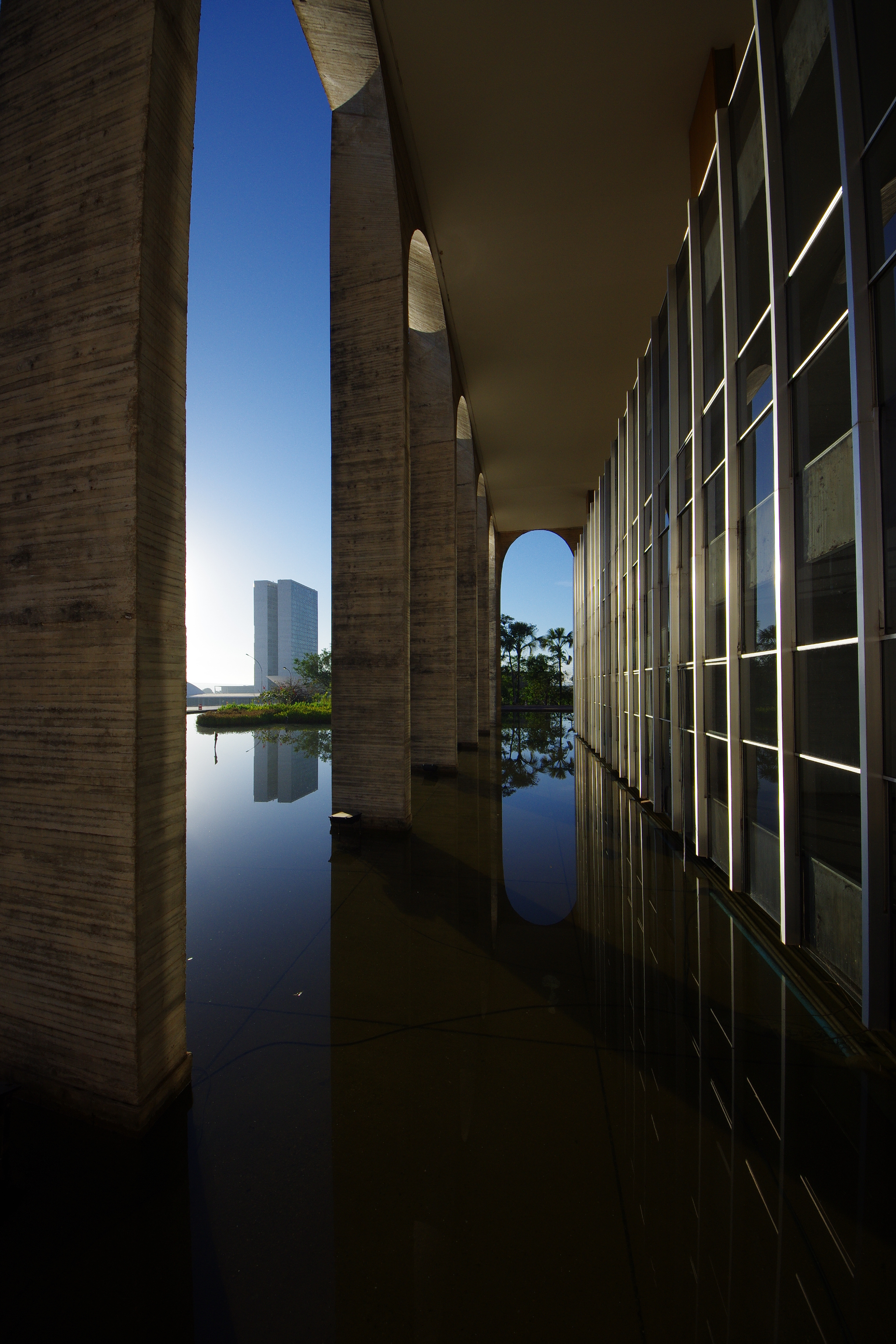 Ministério das Relações Exteriores - DF, BRASIL